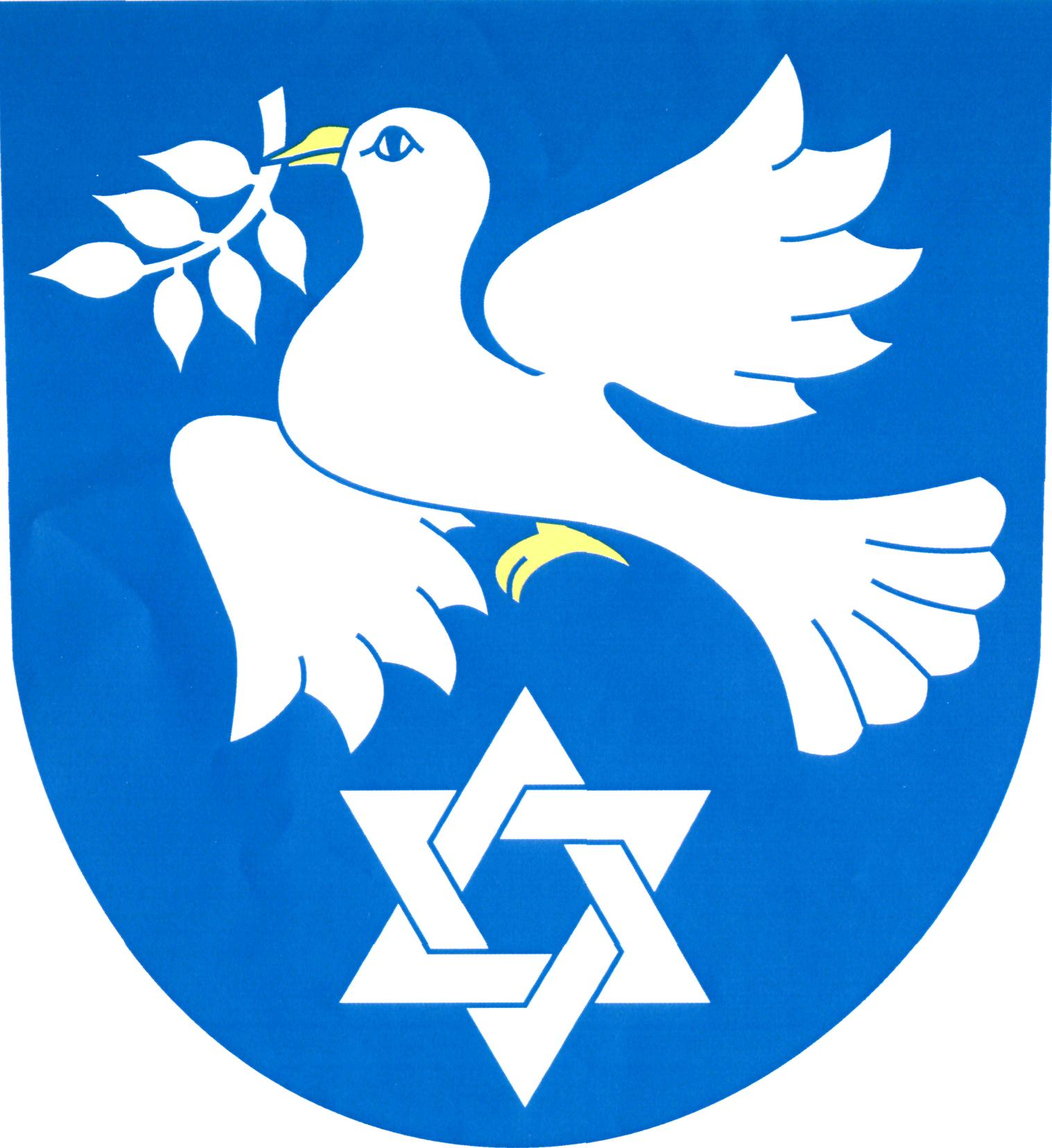 Znak obce Hroubovice